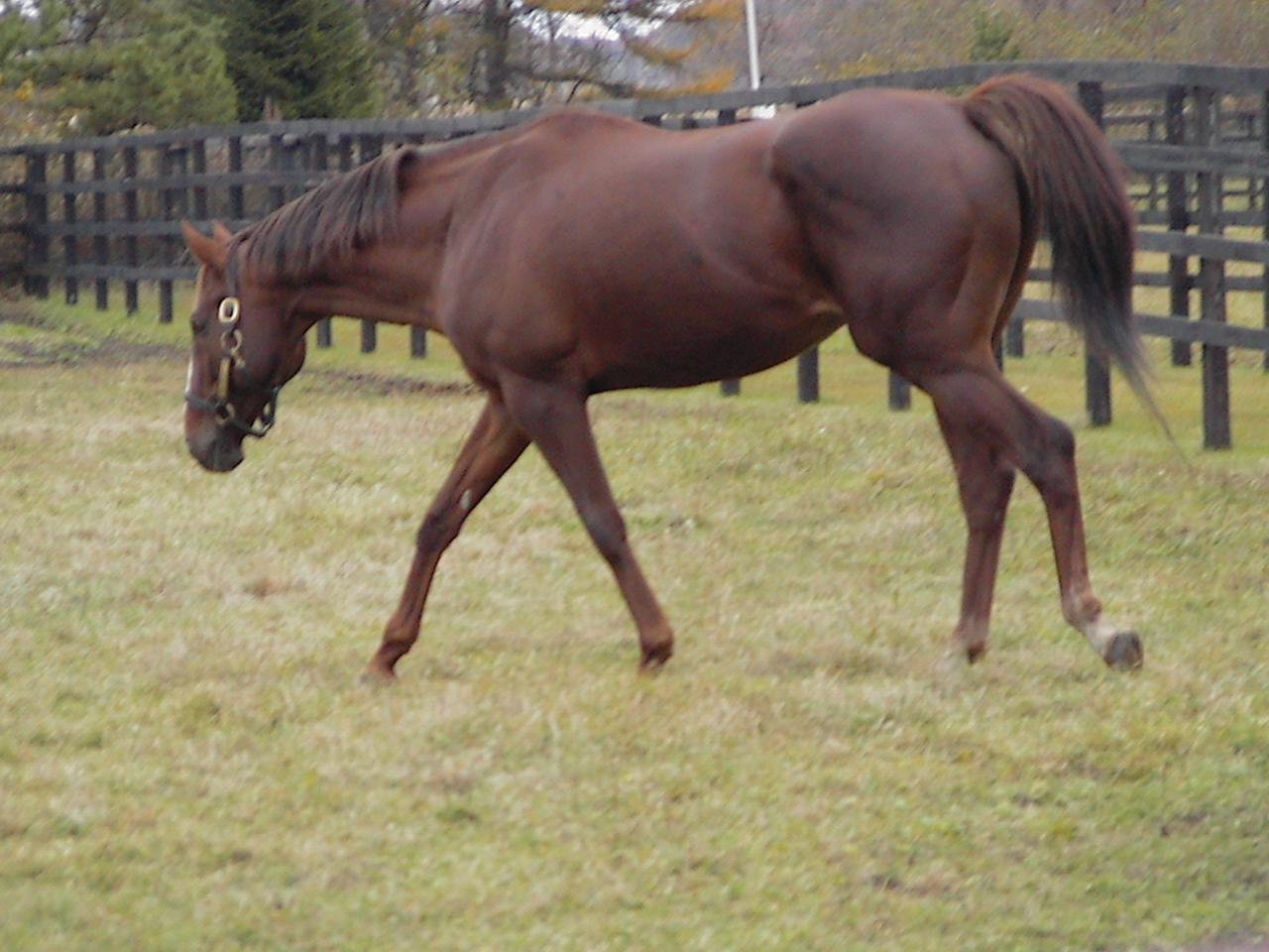 ブリーダーズ・スタリオン・ステーションの牧場見学にて撮影